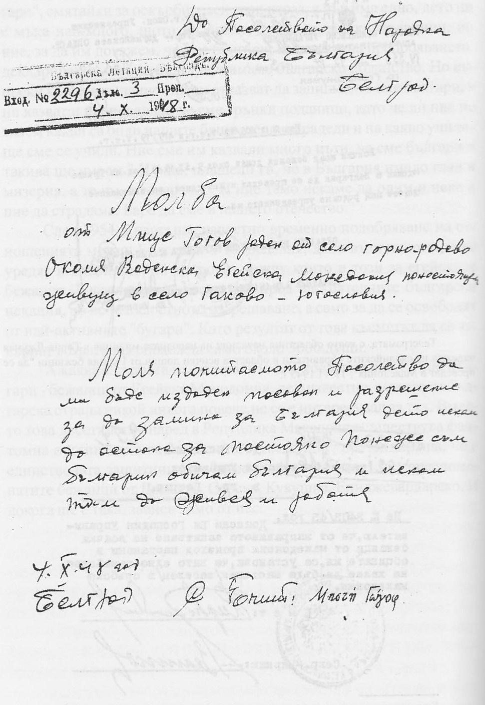 Молба от бежанеца от Горно Родиво Мице Гогов, Егейска Македония за прехвърляне от Югославия в България.